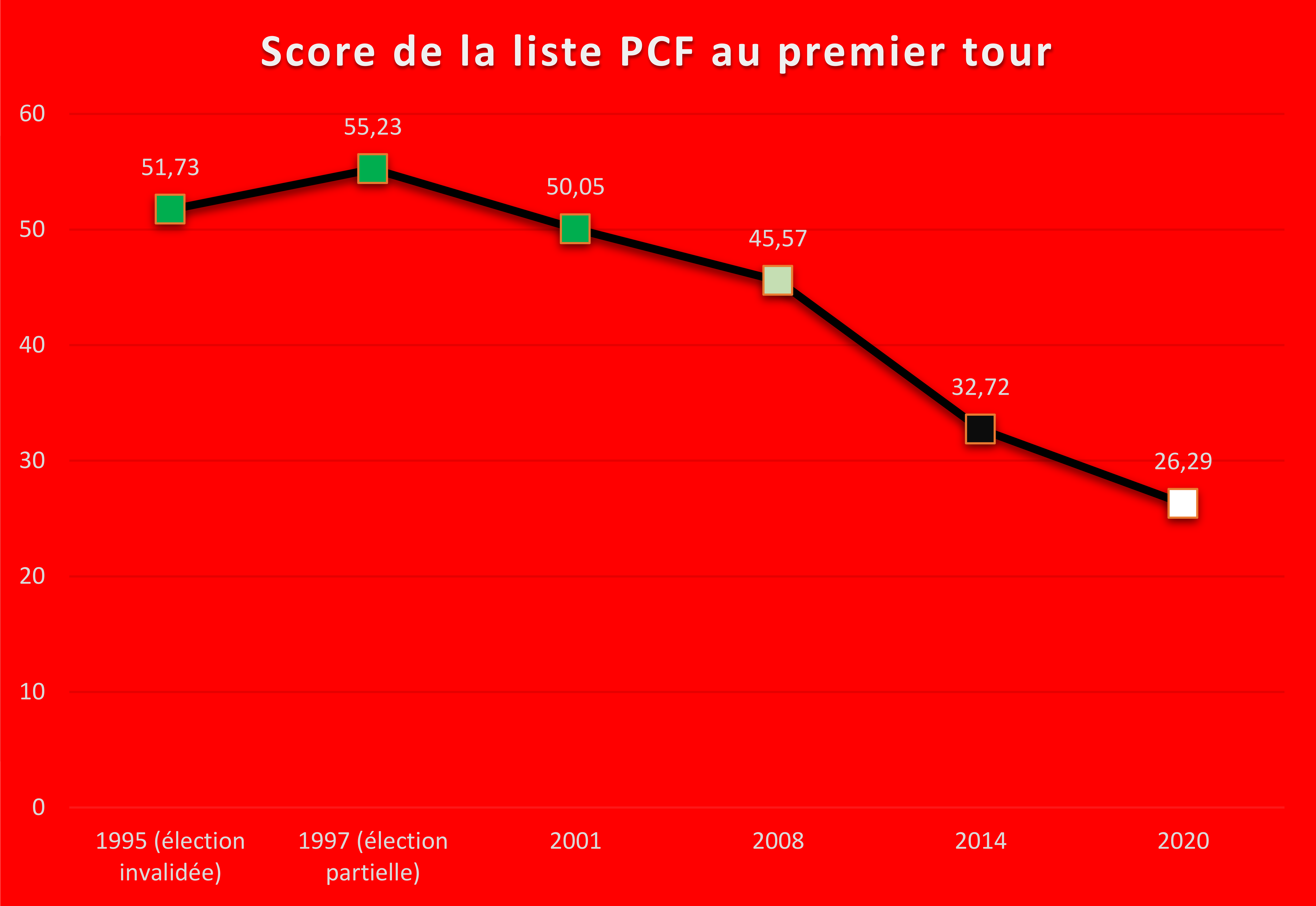 Evolution du score de la liste conduite par le Parti communiste français au premier tour de l'élection municipale à Villlejuif (94) entre 1995 et 2020